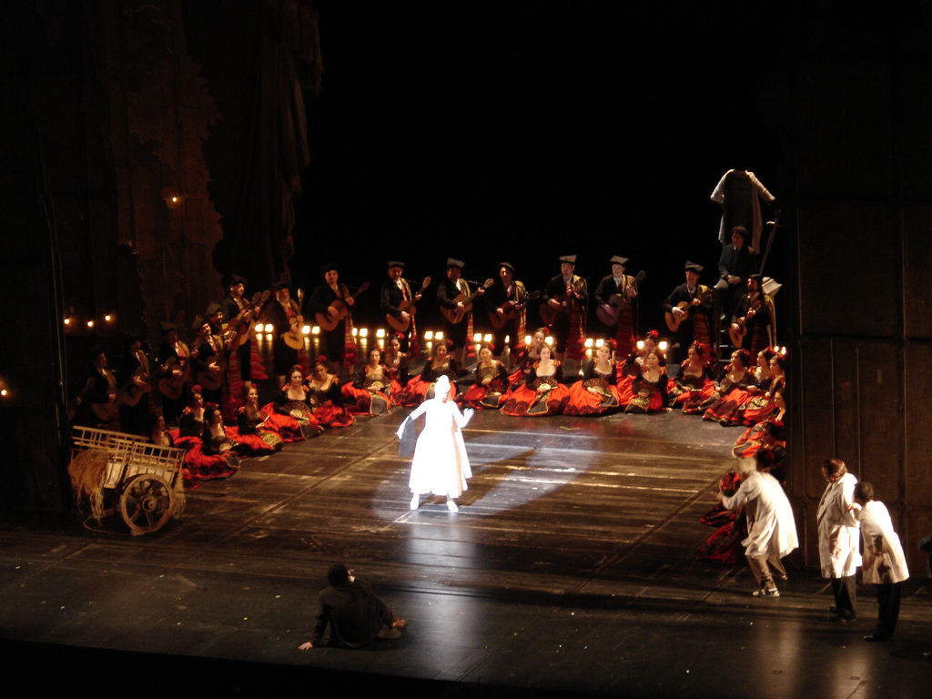 Opéra Bastille